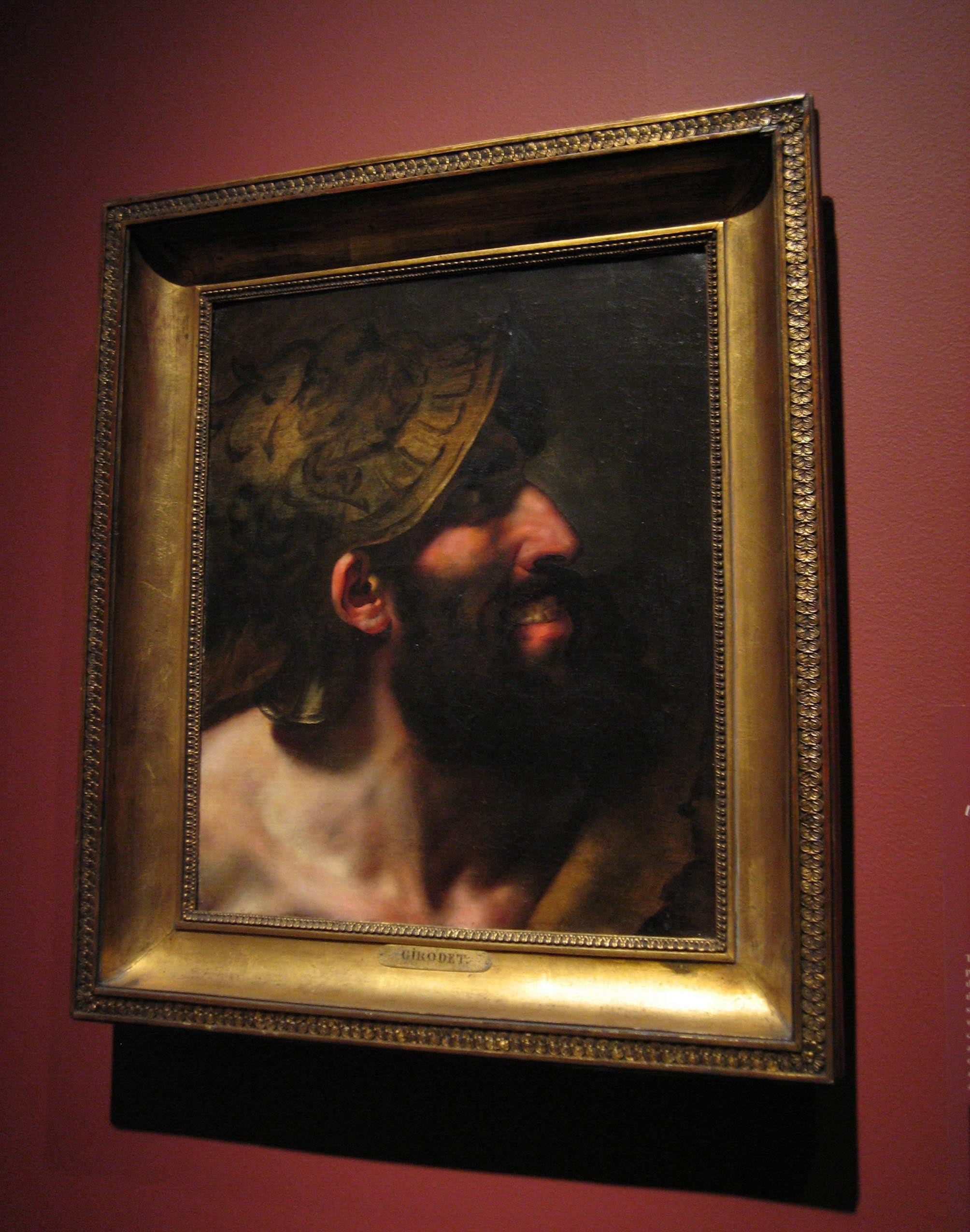 Tête du Blasphémateur - drawing of Girodet-Trioson (1767-1824)